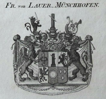 Wappen derer Freiherren Lauer (Laur) von Münchhofen.